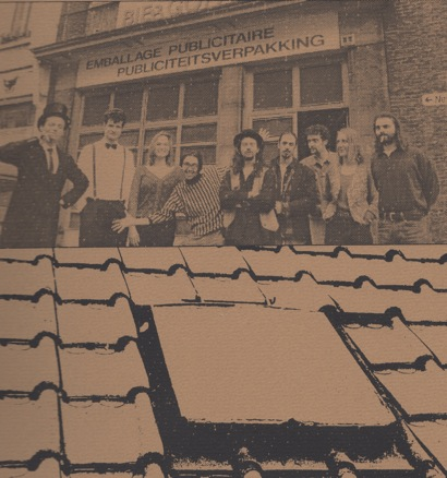 Les membres fondateur du projet Moving Art Studio